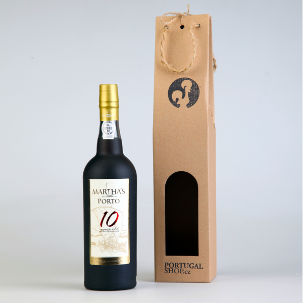 Portské víno 10let